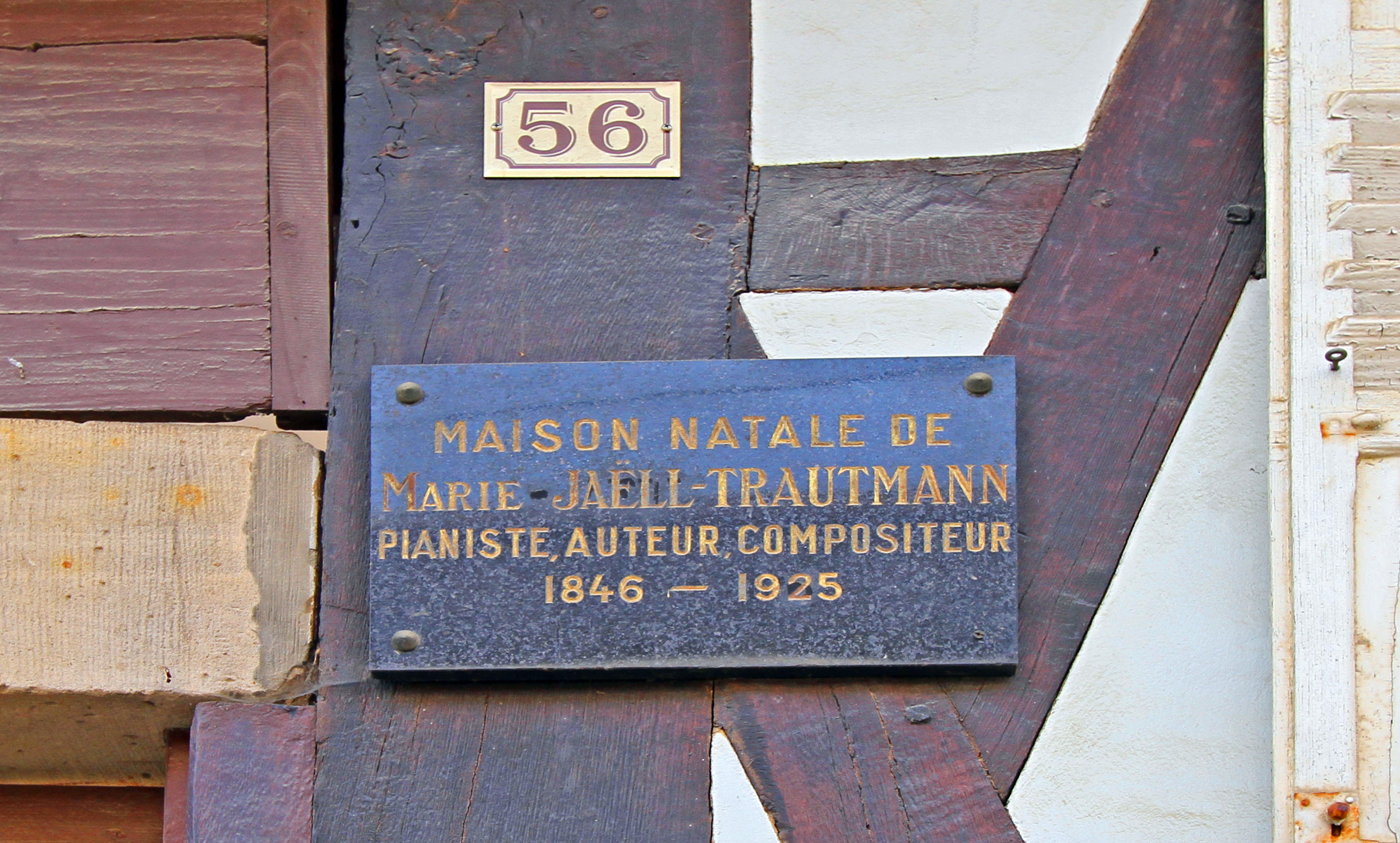 Steinseltz